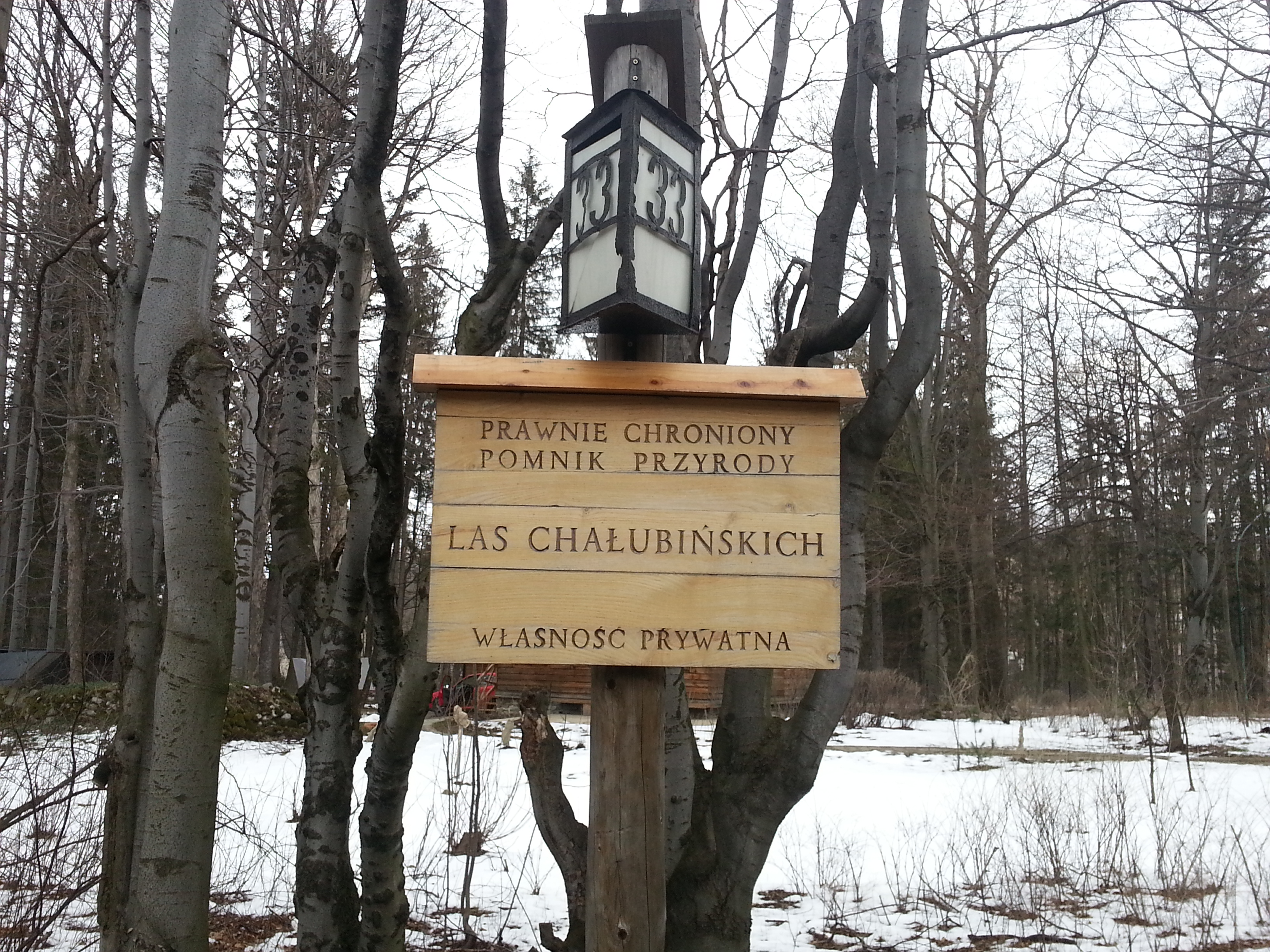 Tabliczka przy lesie Chałubińskich